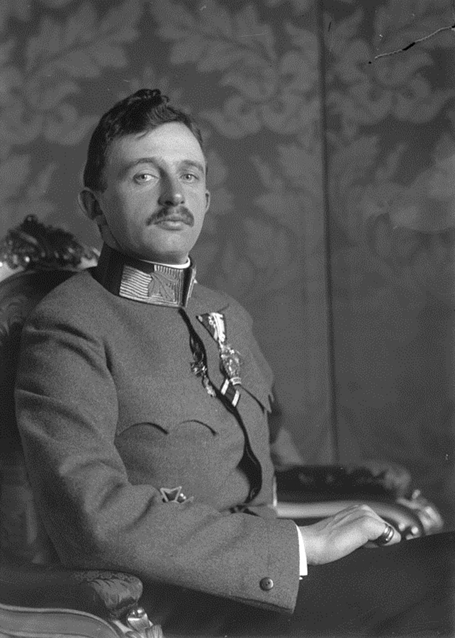 El emperador austrohúngaro Carlos de uniforme y con brazalete de luto.